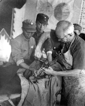 1938年，白求恩大夫在手术中